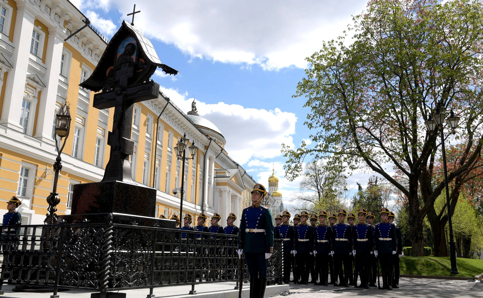 Открытие памятника великому князю Сергею Александровичу с участием Президента России Владимира Путина и Патриарха Московского и всея Руси Кирилла в сквере у Никольской башни Московского Кремля